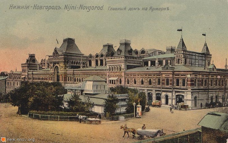 Главный ярмарочный дом